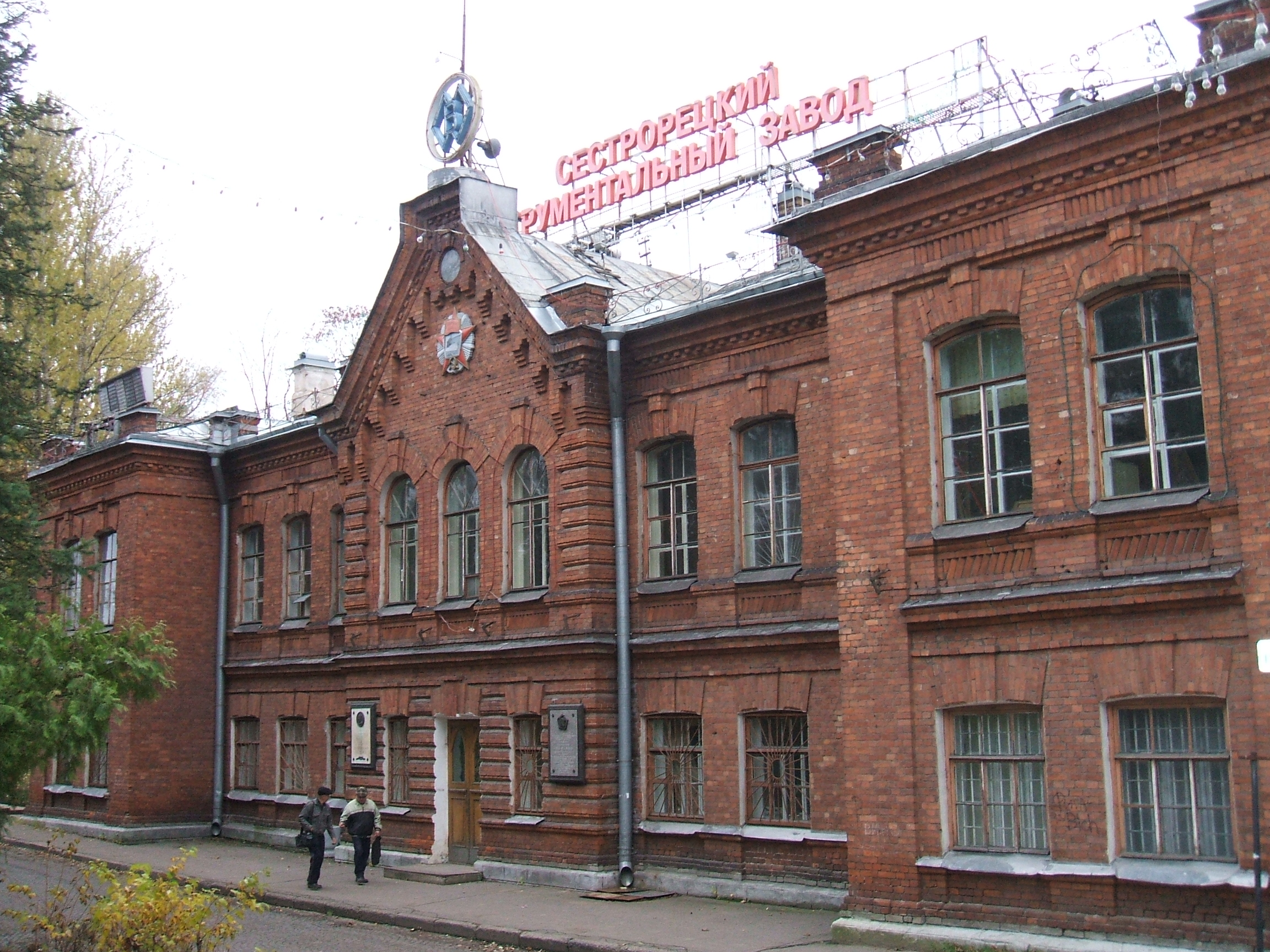 Заводоуправление Сестрорецкого инструментального завода в Санкт-Петербурге